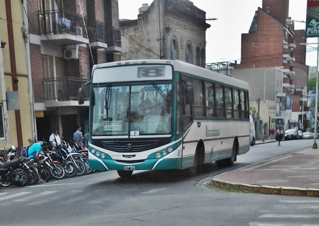 Colectivo Línea 8, Interno 83, Empresa Transporte Mariano Moreno S.R.L. - Ciudad de Paraná, Entre Ríos, Argentina - ColectivosEntreRios.